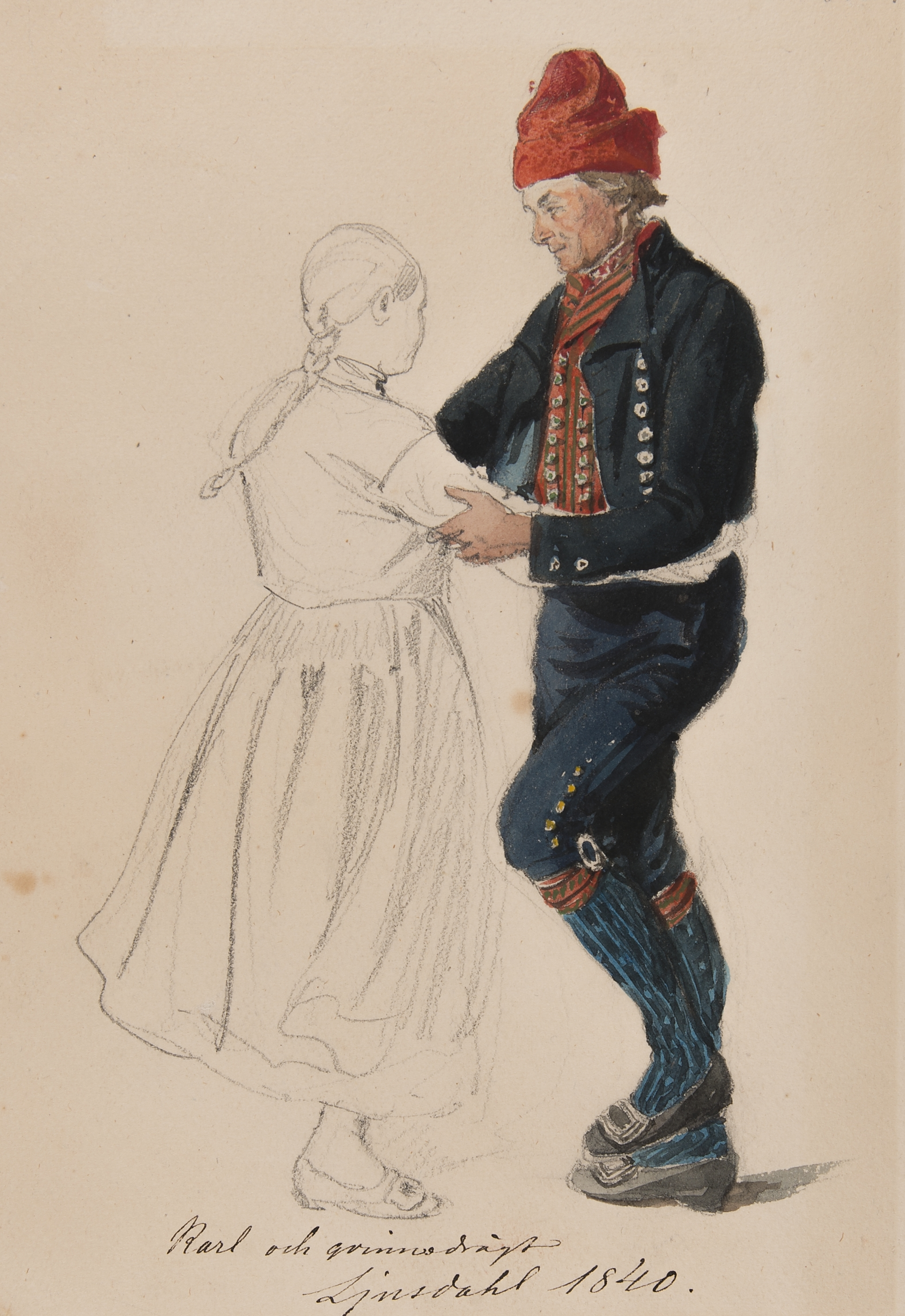 "Karl och qvinnodrägt, Ljusdahl 1840" Blyerstskissad kivnna och akvarellerad man som dansar. Akvarell av J.W Wallander. Depicted place: Q10568426 (Q10568426)